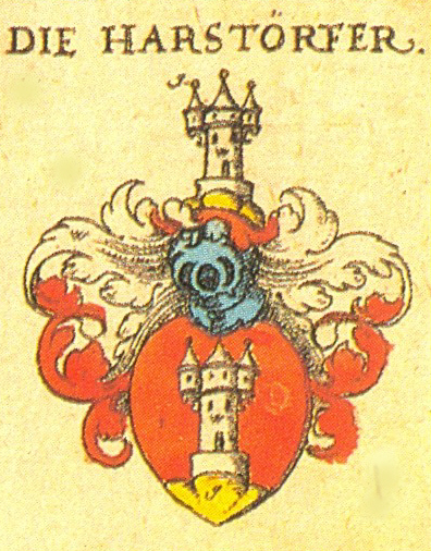 Wappen der Nürnberger Patrizierfamilie Harsdorf von Enderndorf